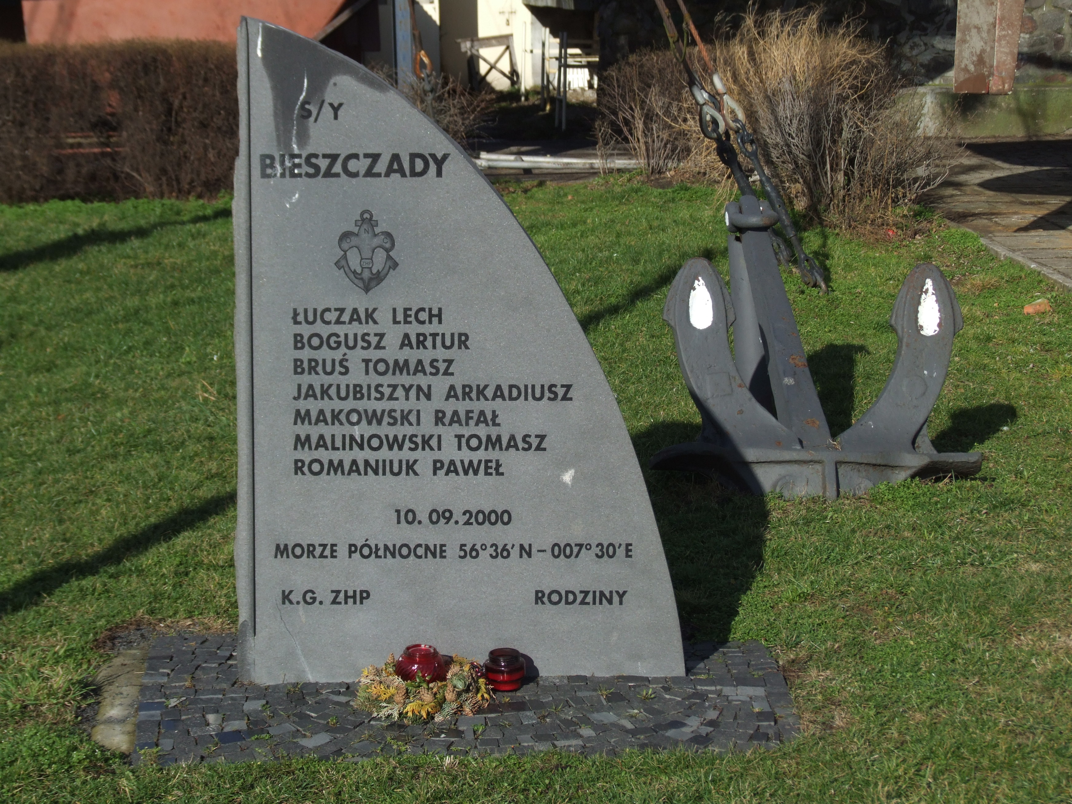 Pomnik ofiar zatonięcia S/Y Bieszczady - Gdynia